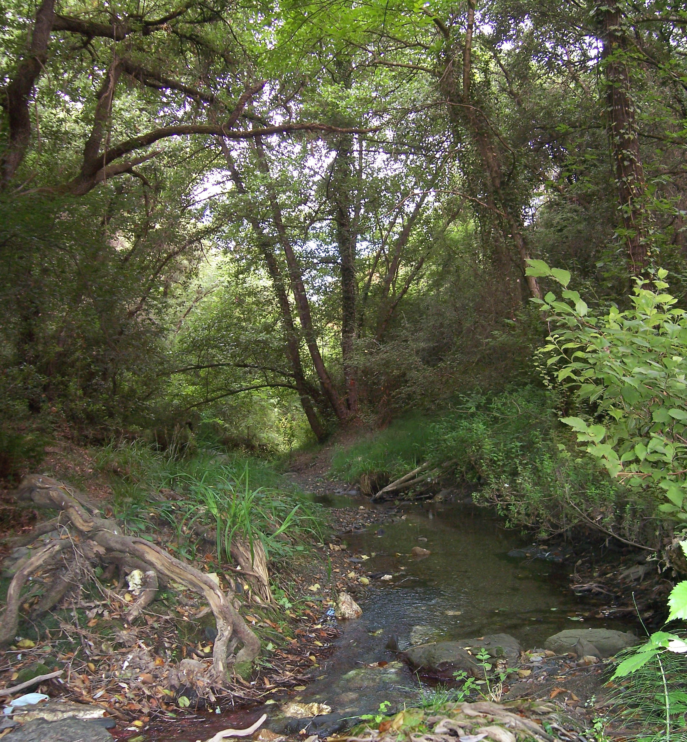 Bosc de ribera al Collserola, la Rierada. Riera de Vallvidrera.